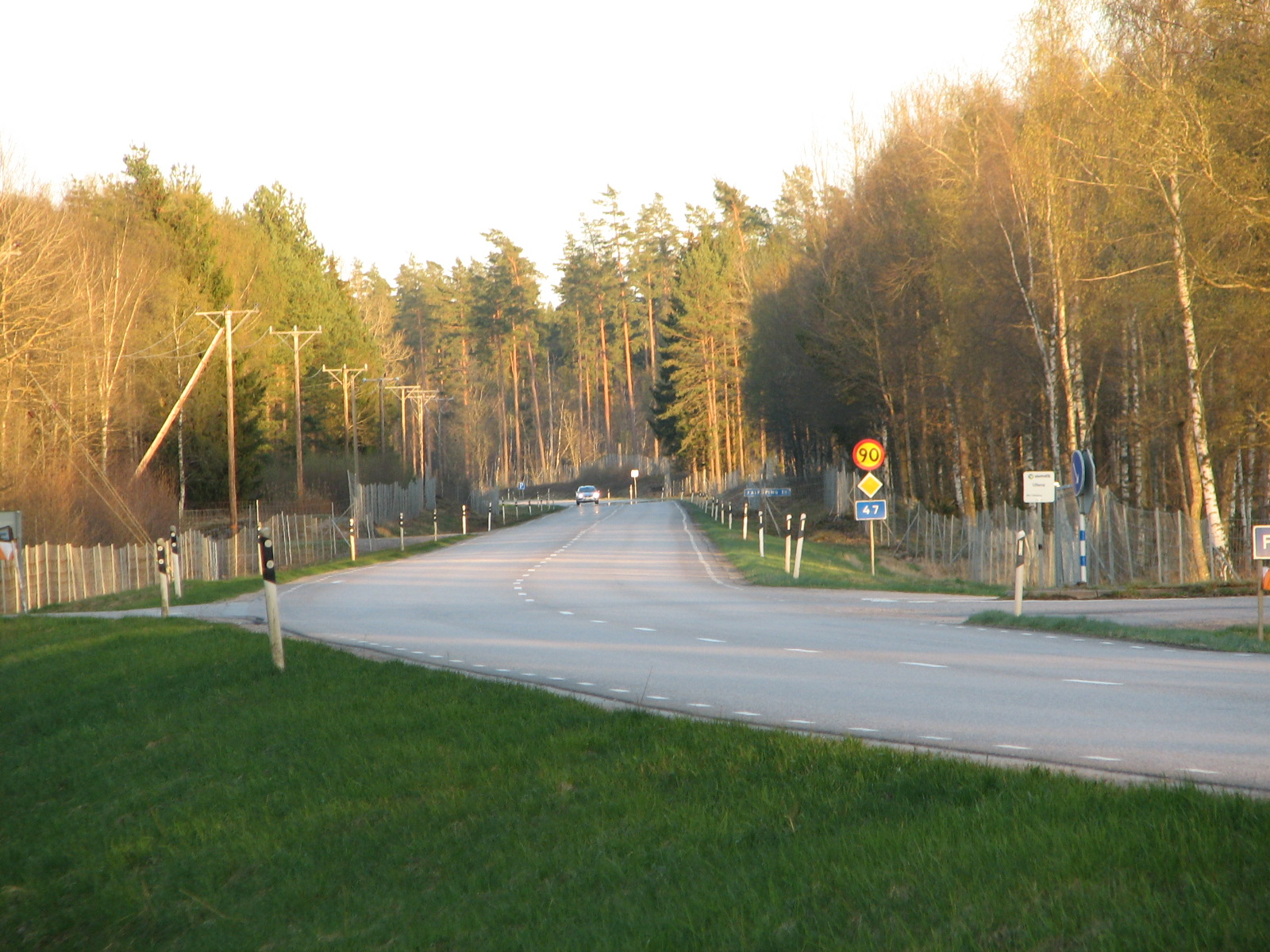 Riksväg 47 at Ullene in Falköping municipality, Sweden